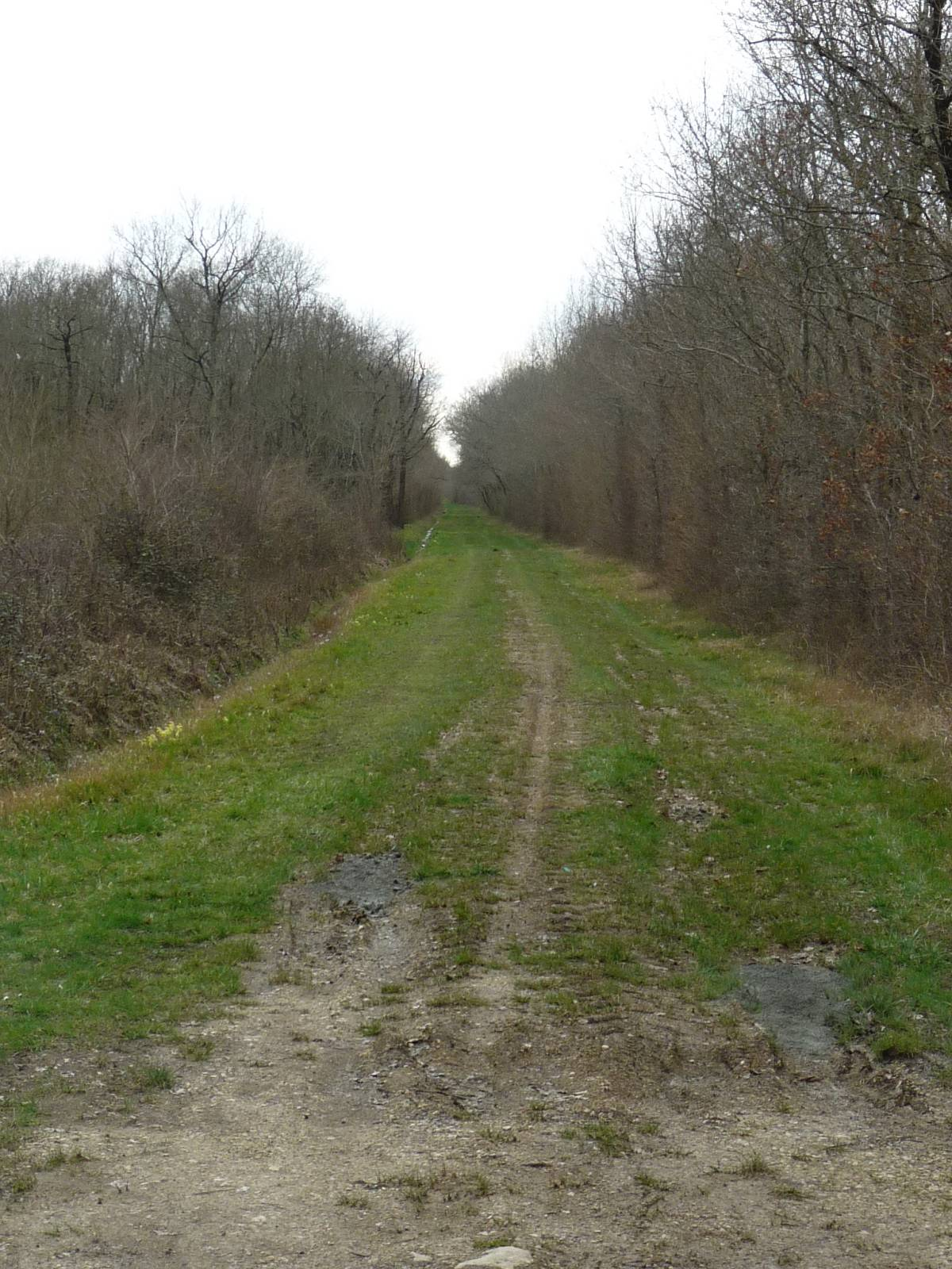 la voie d'Agrippa à Ste-Sévère, Charente, France. Vue vers l'ouest, lorsqu'elle quitte la D.55.